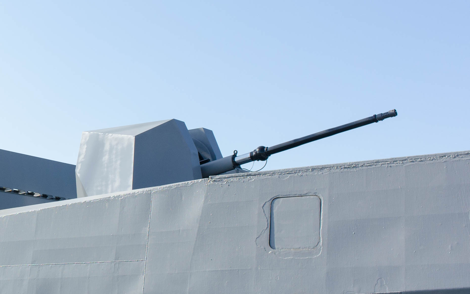 中文（台灣）: 巡防艦武昌（PFG-1207）艦首換裝試製新型匿蹤砲盾的OTO Melara 76mm快砲，攝於2014年左營軍港營區開放活動。